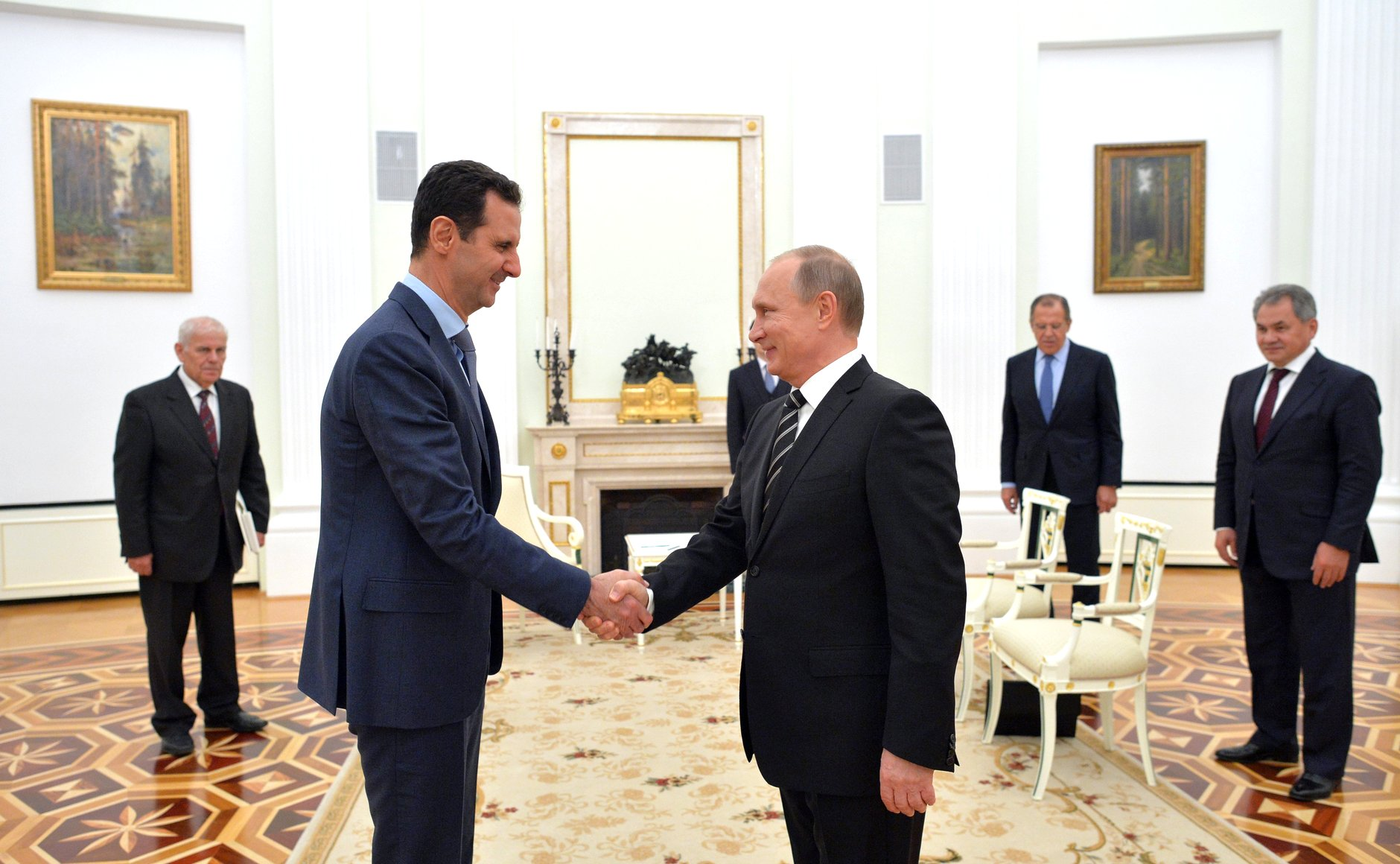 Рабочий визит в Россию Президента Сирии Башара Асада. Встреча с Президентом России Владимиром Путиным